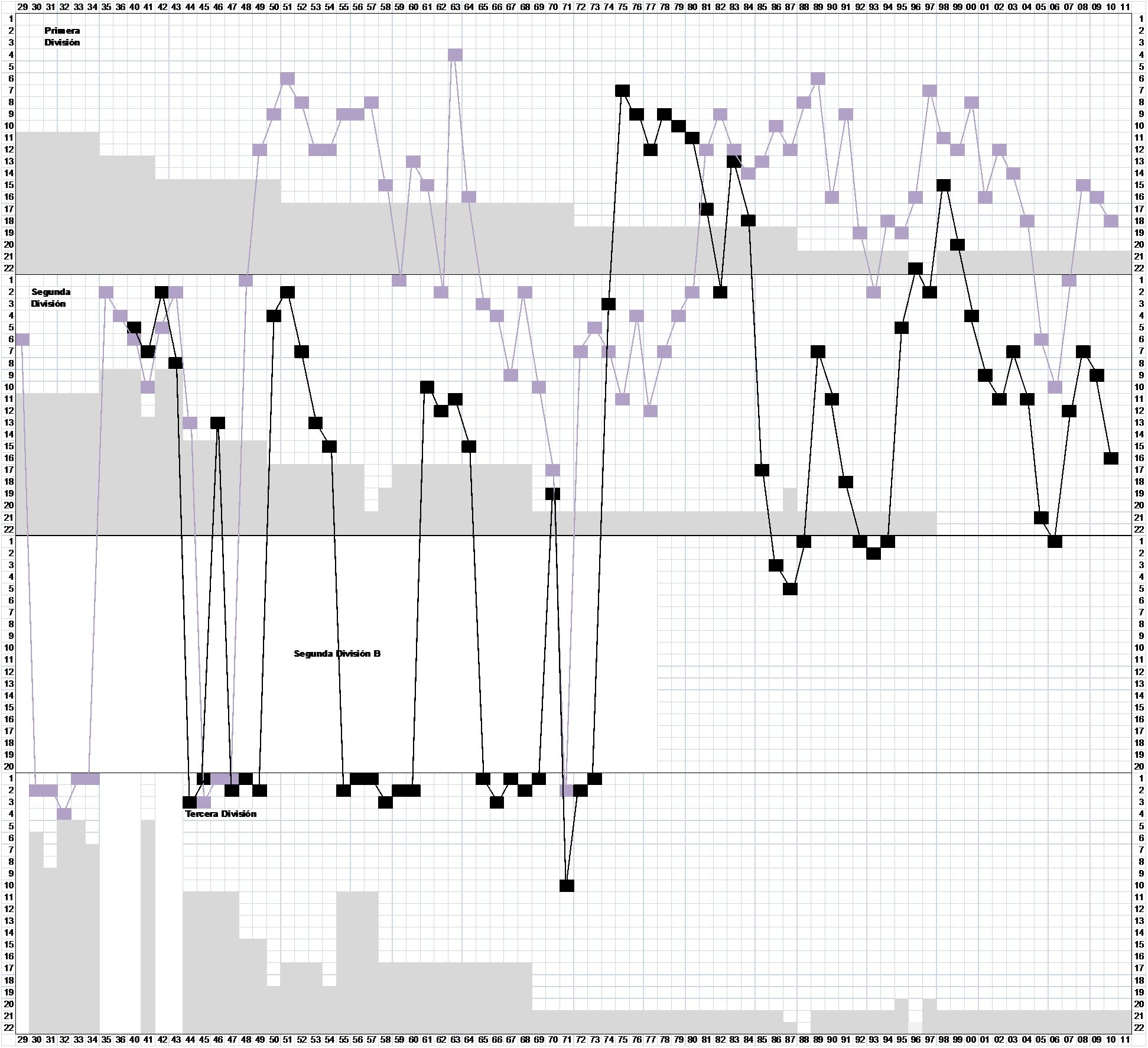 comparativa historica real valladolid y salamanca